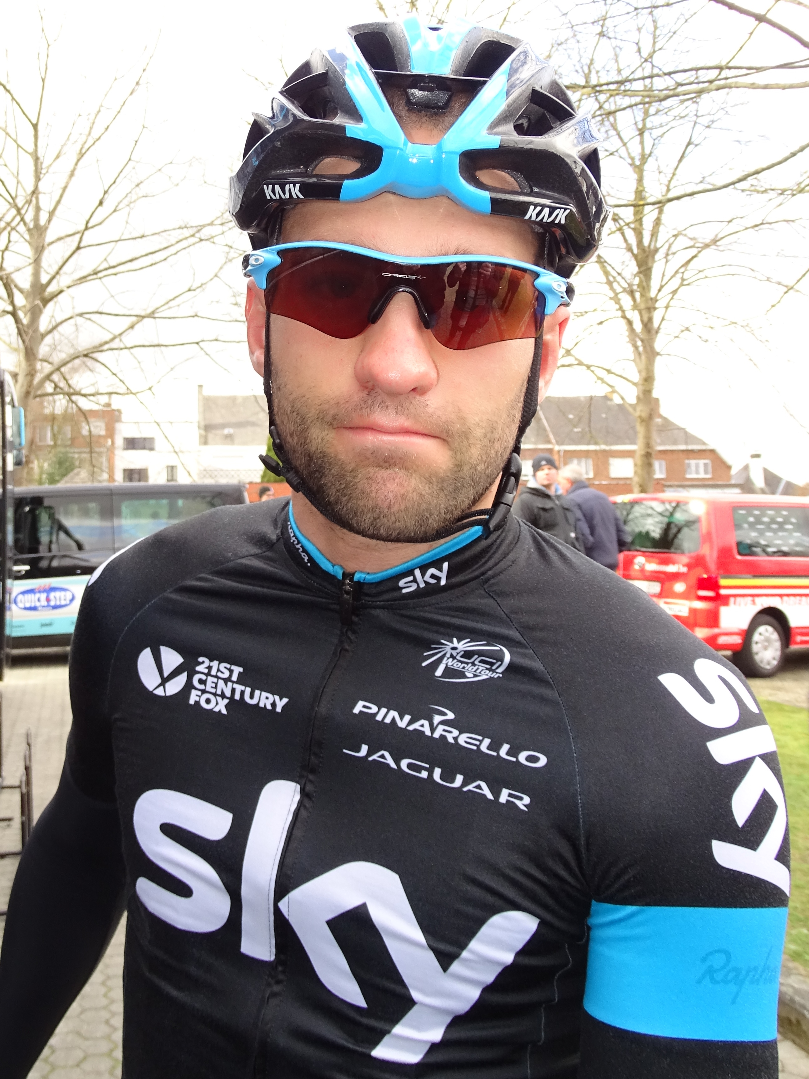 Reportage réalisé le mercredi 1er avril à l'occasion du départ de la deuxième étape des Trois jours de La Panne 2015 à Zottegem, Belgique.